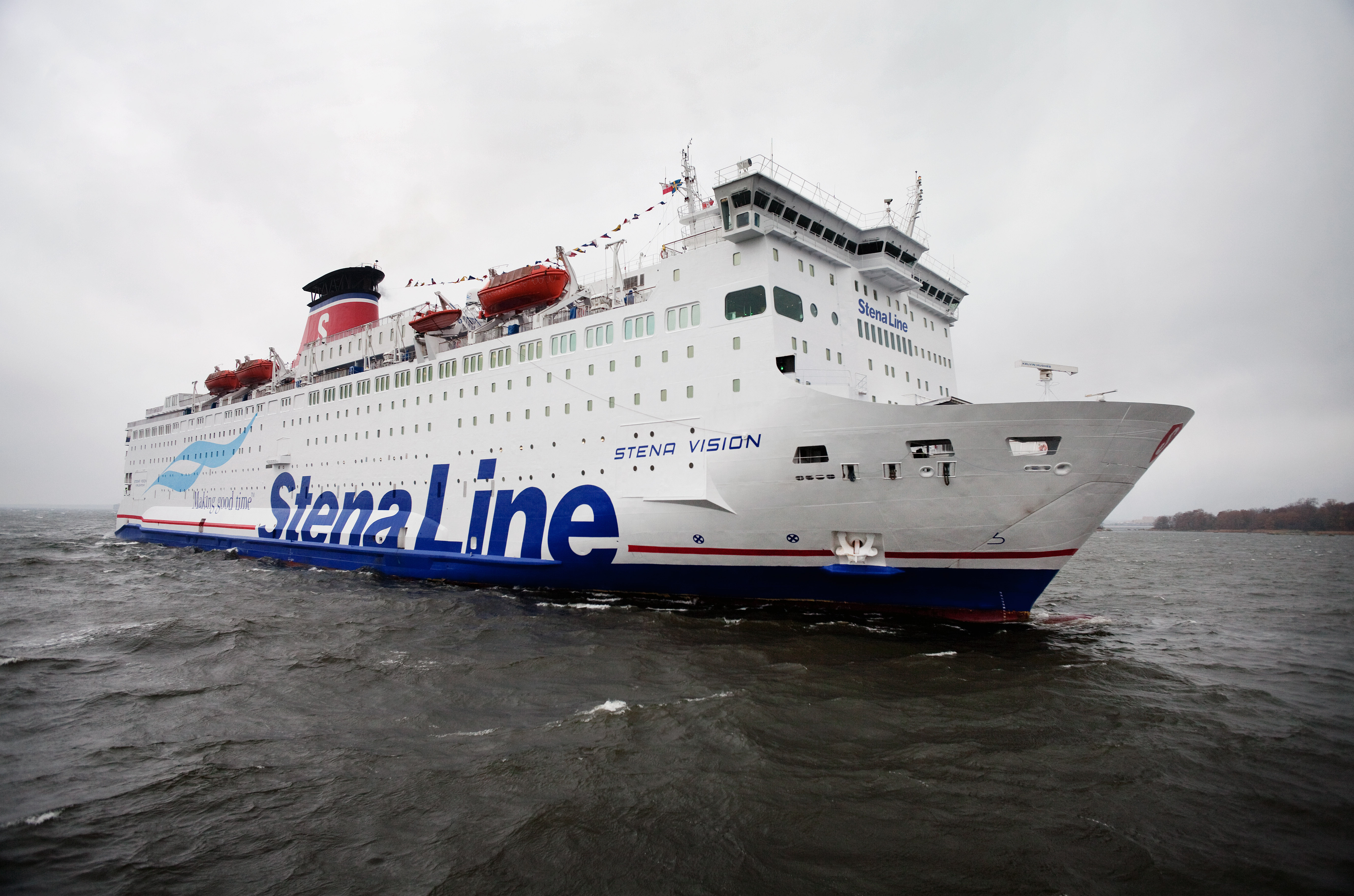 Stena Line ferry 'Stena Vision'